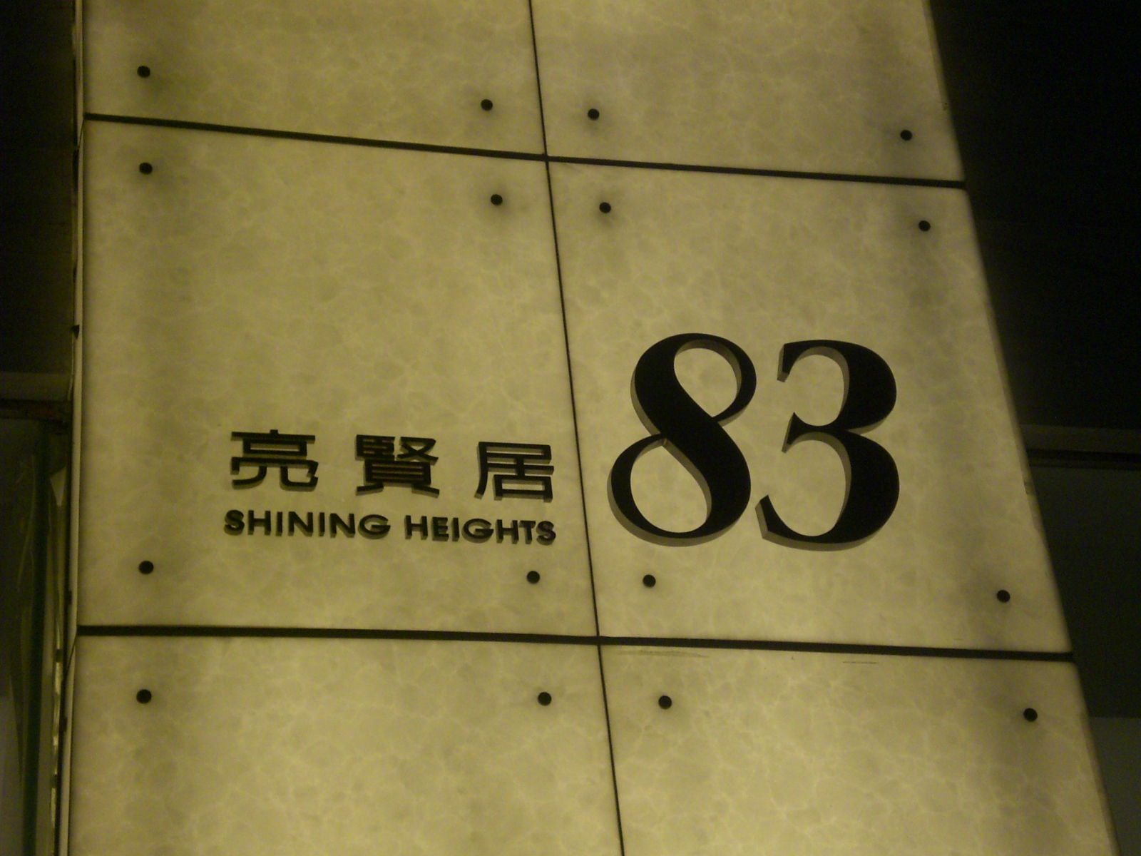 中文（香港）: 亮賢居門牌號碼